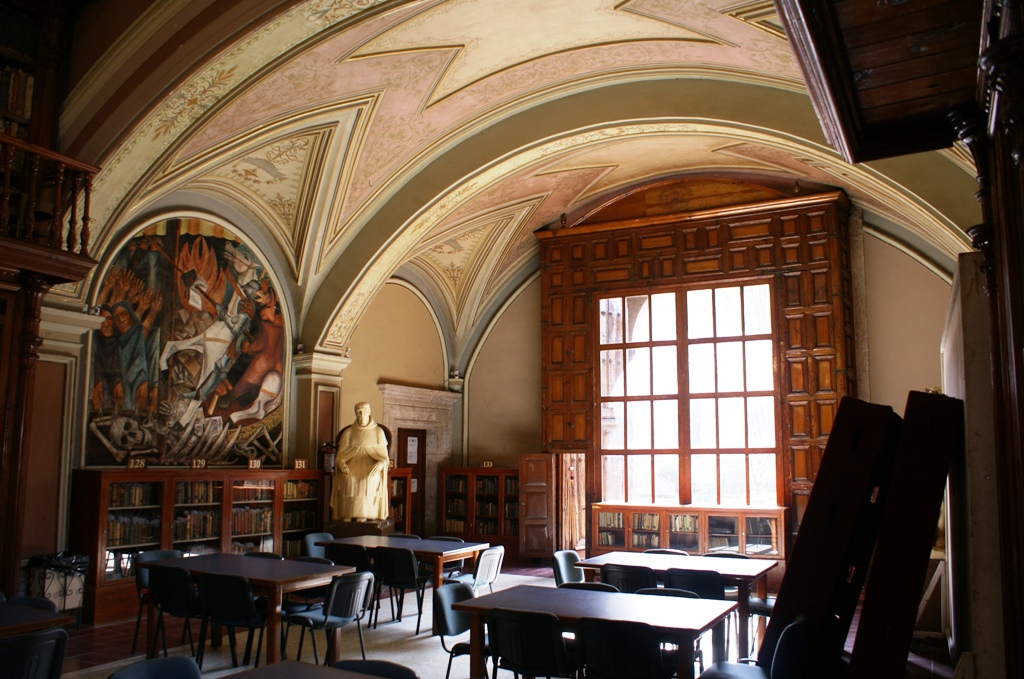 Biblioteca Pública de la Universidad Michoacana ubicada en Av. Madero Poniente esquina con Nigromante, Centro Histórico de Morelia, Michoacán, México. Fundada en 1930, conserva un fondo bibliográfico antiguo de 22,901 volúmenes, que van desde el siglo XV hasta principios del siglo XX. El edificio donde tiene su sede la biblioteca fue un templo de los Jesuitas durante la época del Virreinato de la Nueva España, construido en el siglo XVII en estilo barroco. En su interior la biblioteca conserva murales al fresco pintado a mediados del siglo XX por los artistas estadounidenses Hollis Howard Holbrook, S. C. Schoneberg y R. Hansen así como del mexicano Antonio Silva Díaz.